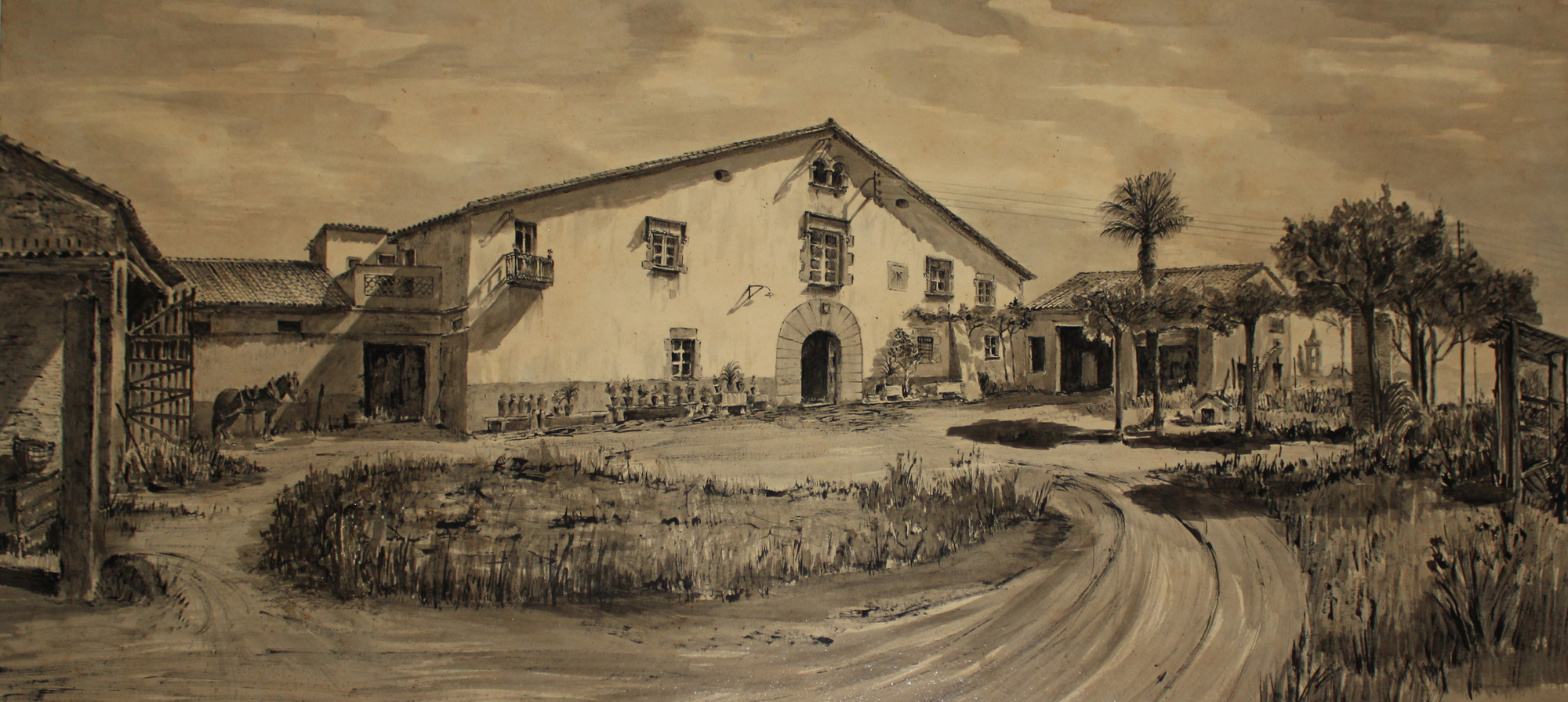 Can Bes (Vilobí d'Onyar)